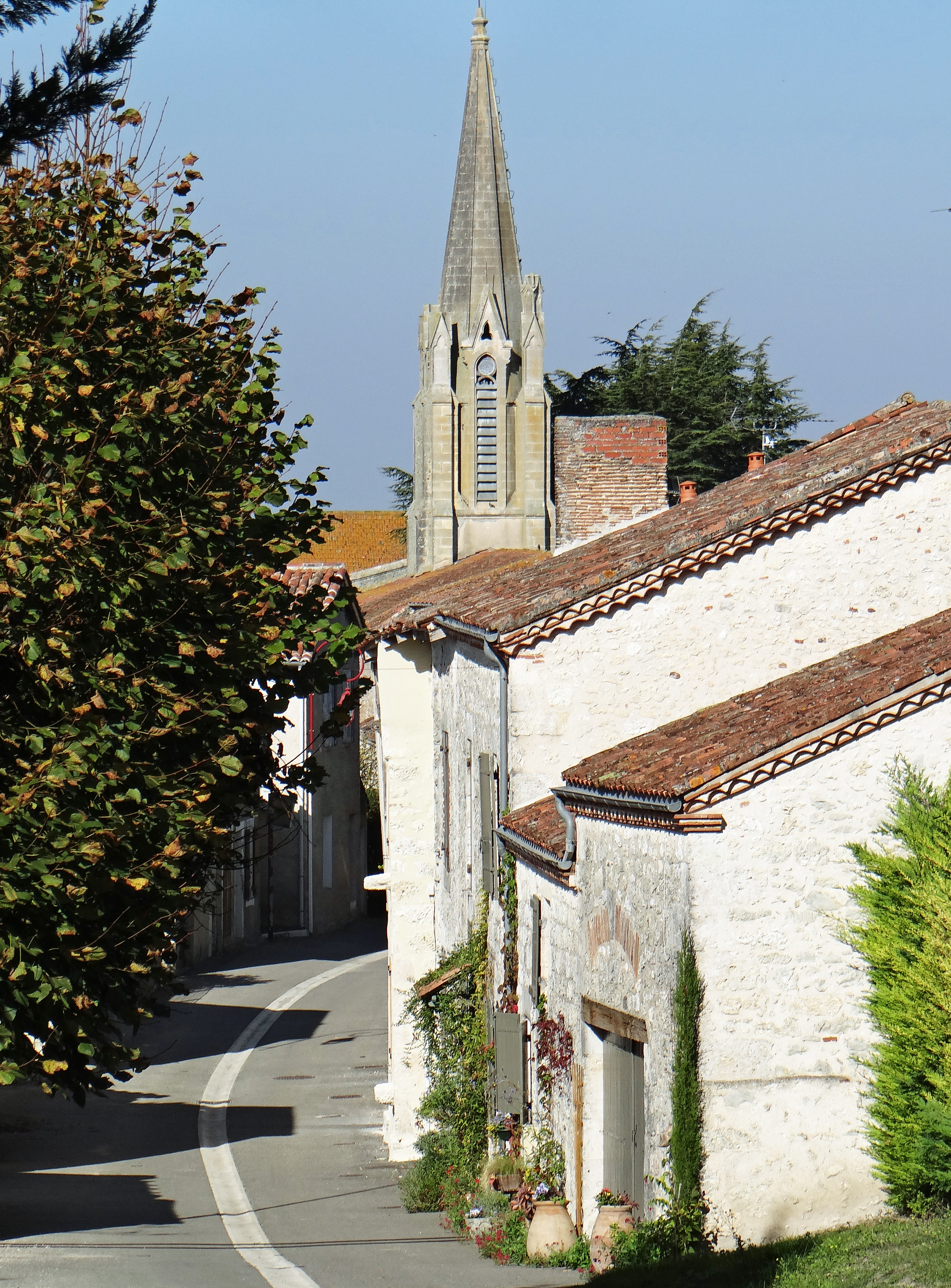 Dolmayrac et l'église Saint-Orens